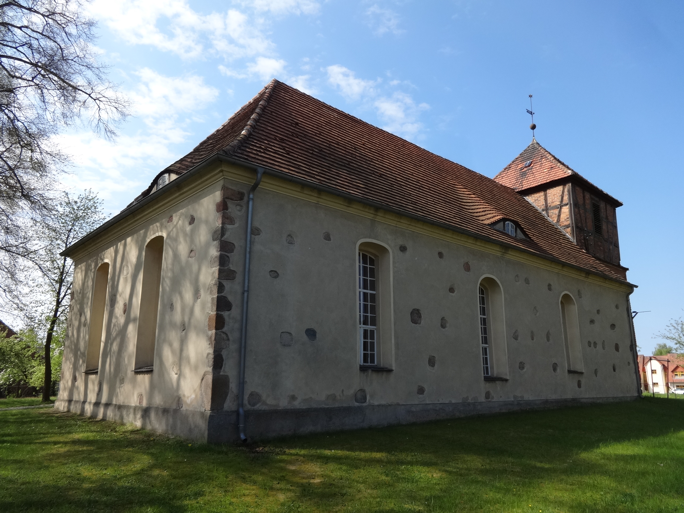 Die evangelische Dorfkirche in Reichenwalde wurde am Ende des 13. Jahrhunderts als Feldsteinkirche errichtet. In der zweiten Hälfte des 18. Jahrhunderts erfolgreichen zahlreiche Umbaumaßnahmen. Dabei wurden unter anderem der Westturm um ein barockes Geschoss in Fachwerk aufgestockt und die Fenster vergrößert. Im Innern befinden sich ein Altarkreuz aus Reddern sowie eine Grueneberg-Orgel von 1864 mit einem dreiteiligen Prospekt.